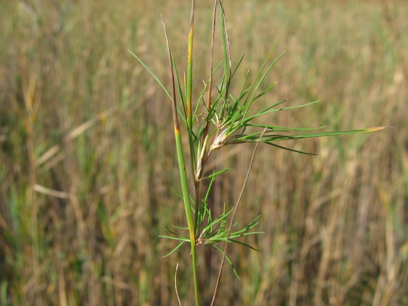 Sumpf-Straußgras (Agrostis canina), Viviparie